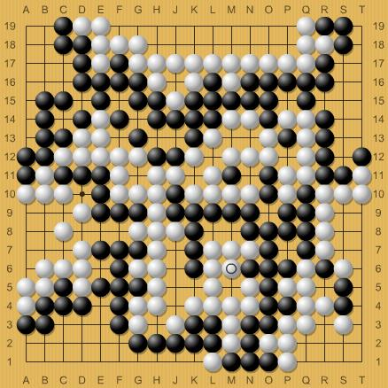 中文（香港）: 原爆之局終局，執白的橋本本因坊以5目優勢勝出。